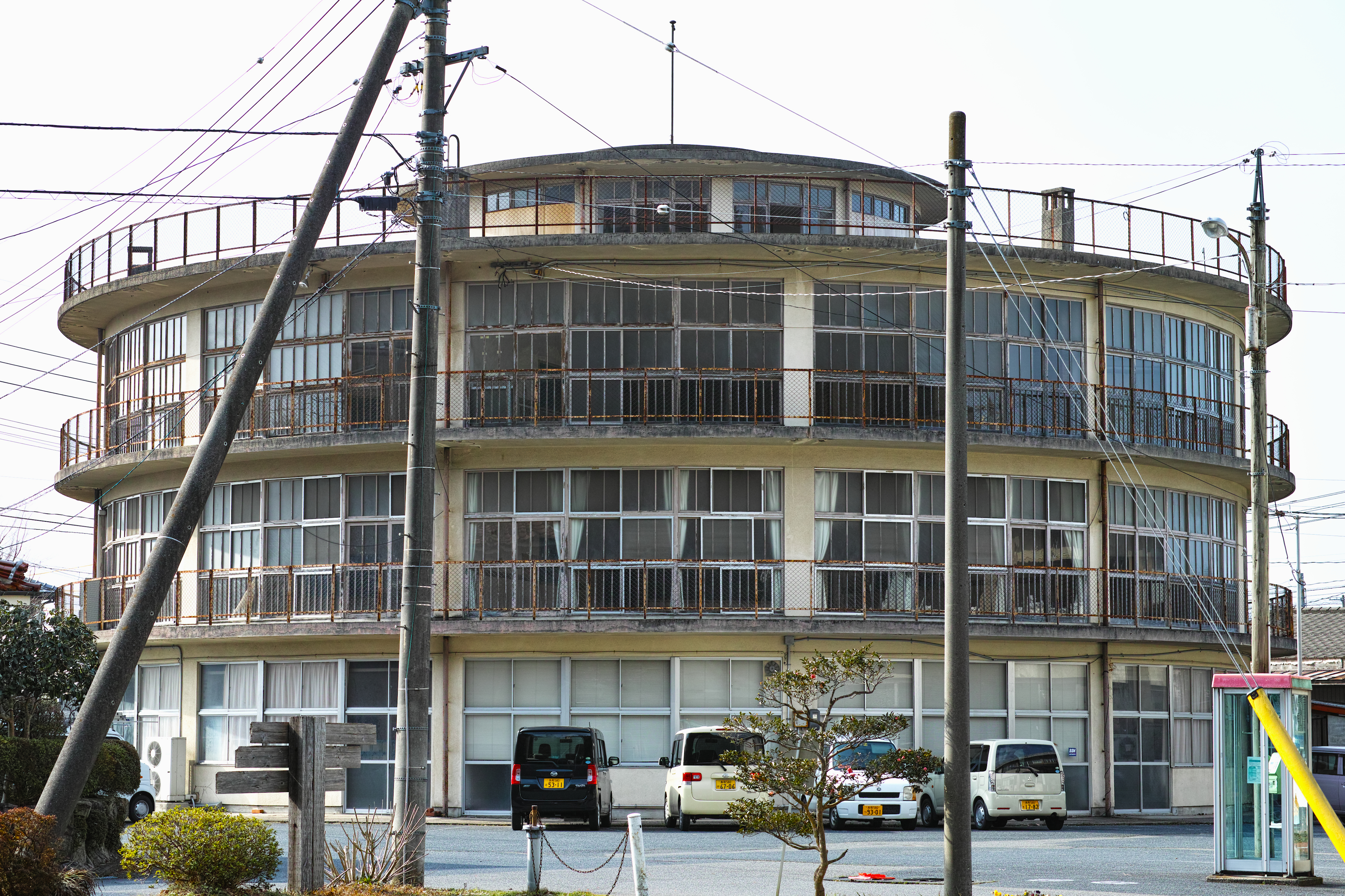 旧明倫小学校の円形校舎。